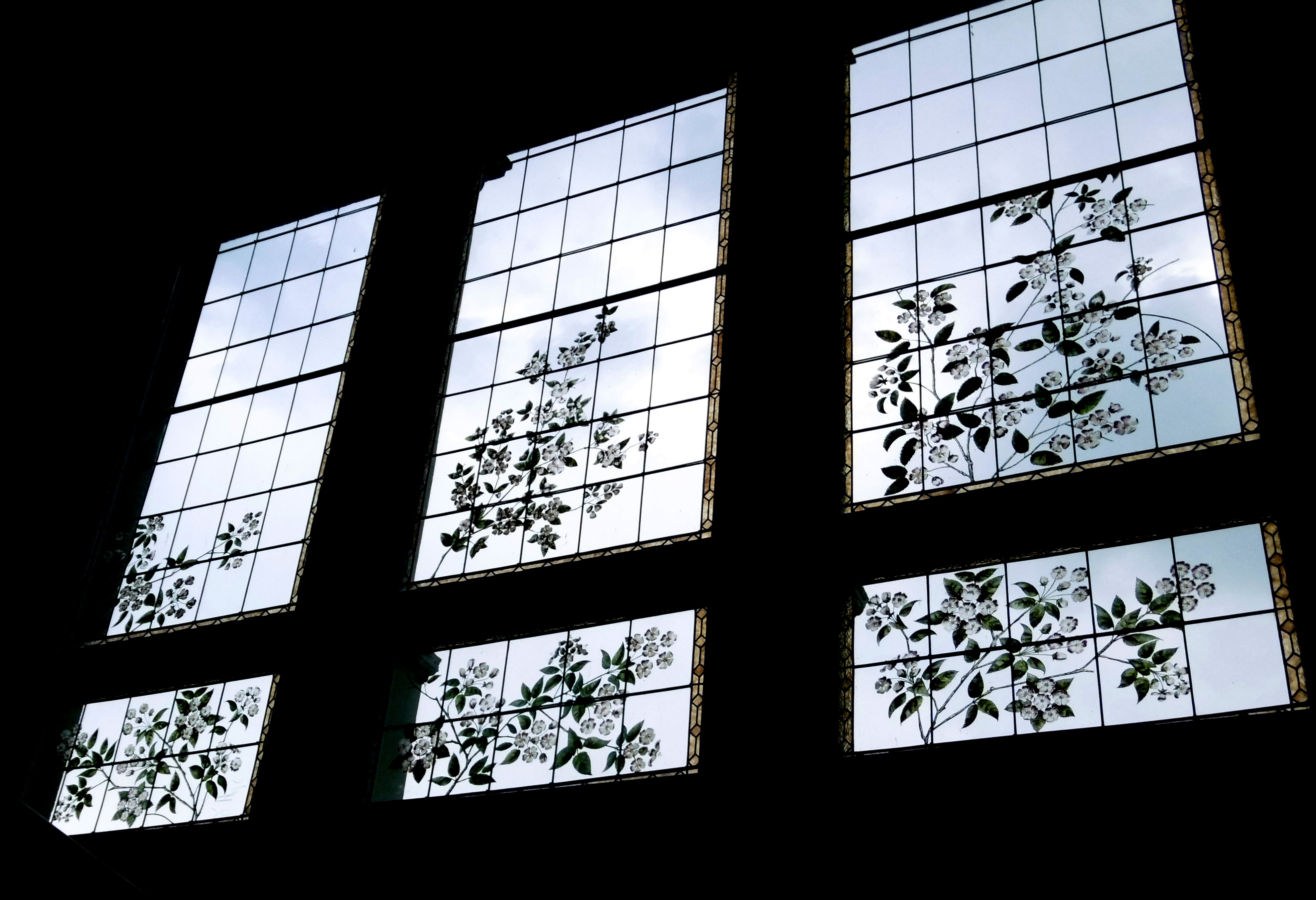 Villa Arthur Peters in Eupen, heute Musikakademie, historische Bleiverglasung